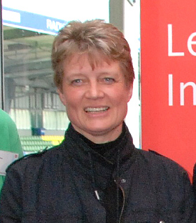 Mannheimer Maimarktturnier 2010, Hannelore Brenner